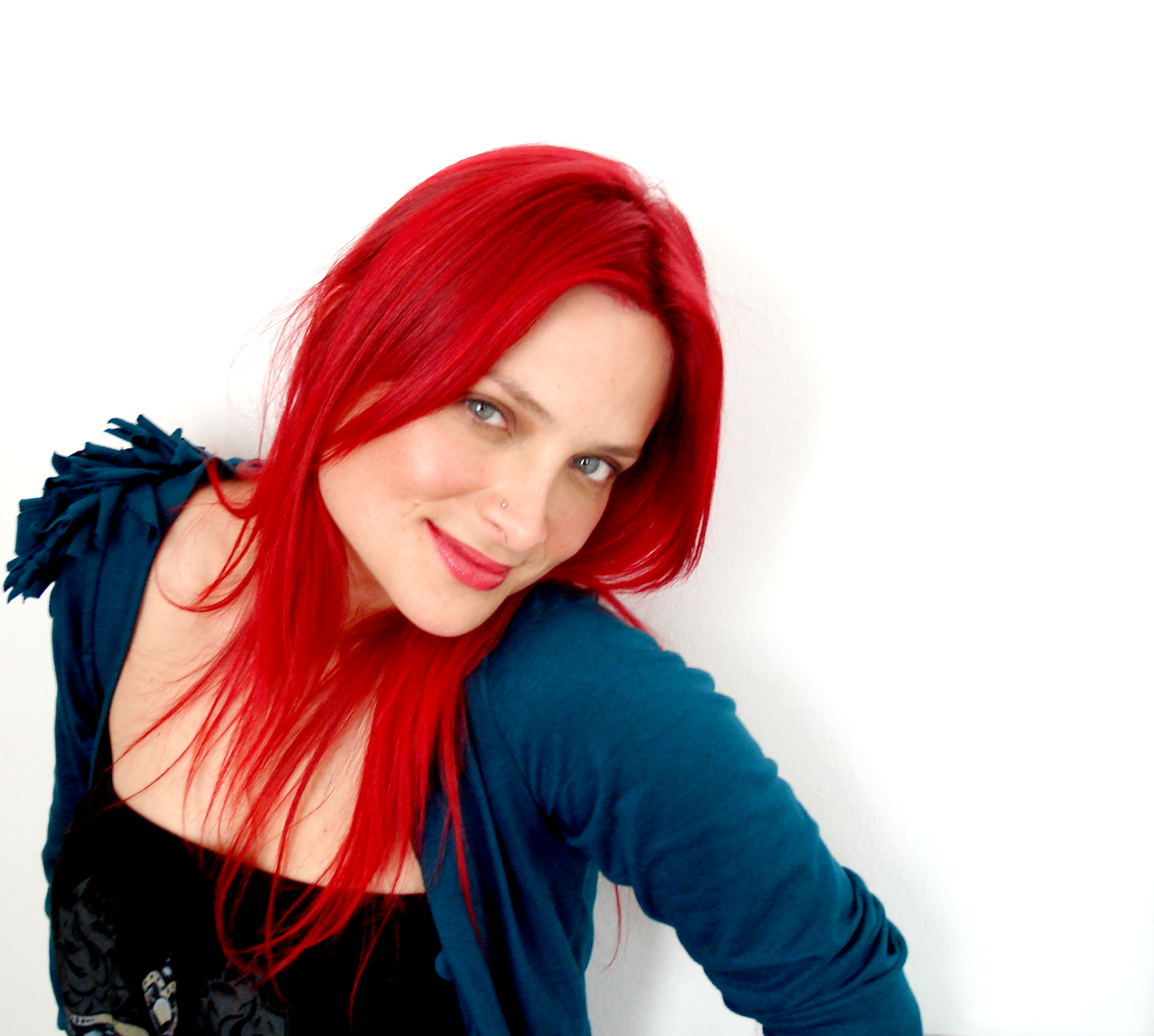 sesión Paniko.cl, foto de Andrés Panes